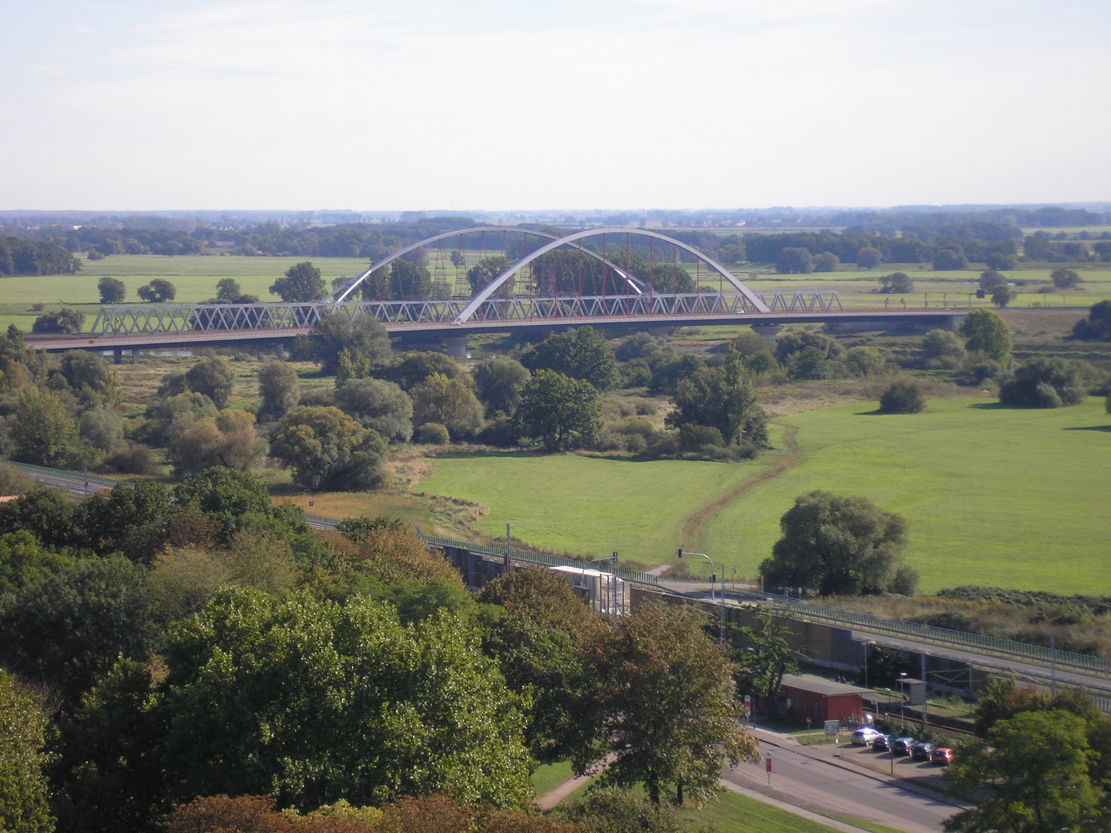 Die neue Eisenbahnbrücke der Strecke Berlin—Leipzig und die neue Straßenbrücke der Bundesstraße 2 über die Elbe in Lutherstadt Wittenberg vom Turm der Schlosskirche aus gesehen.